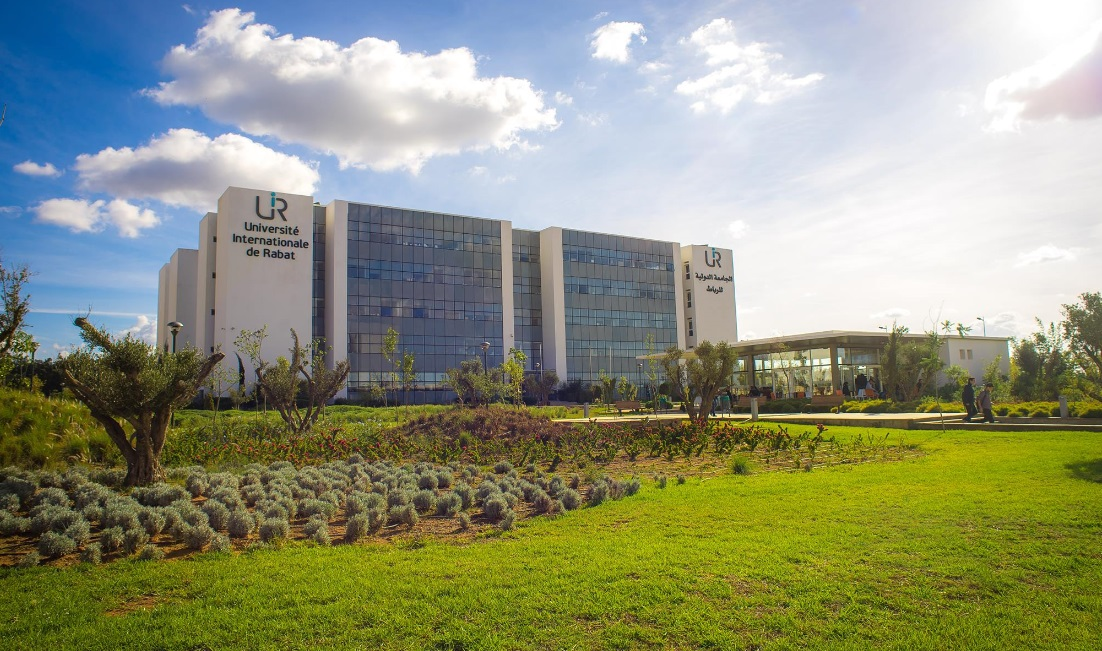 Bâtiment d'enseignement - UIR